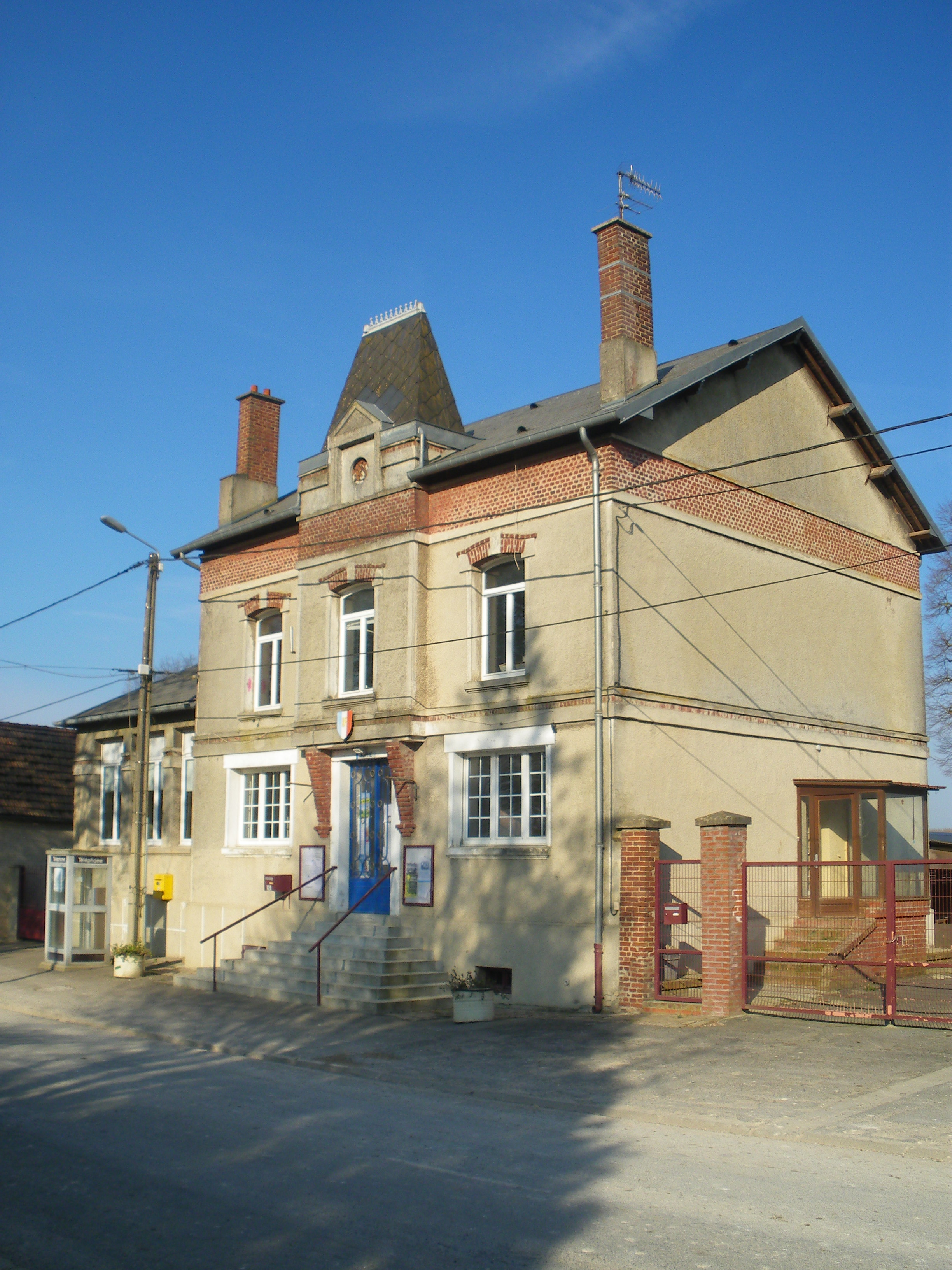 Vue de la mairie de Riencourt-lès-Bapaume.